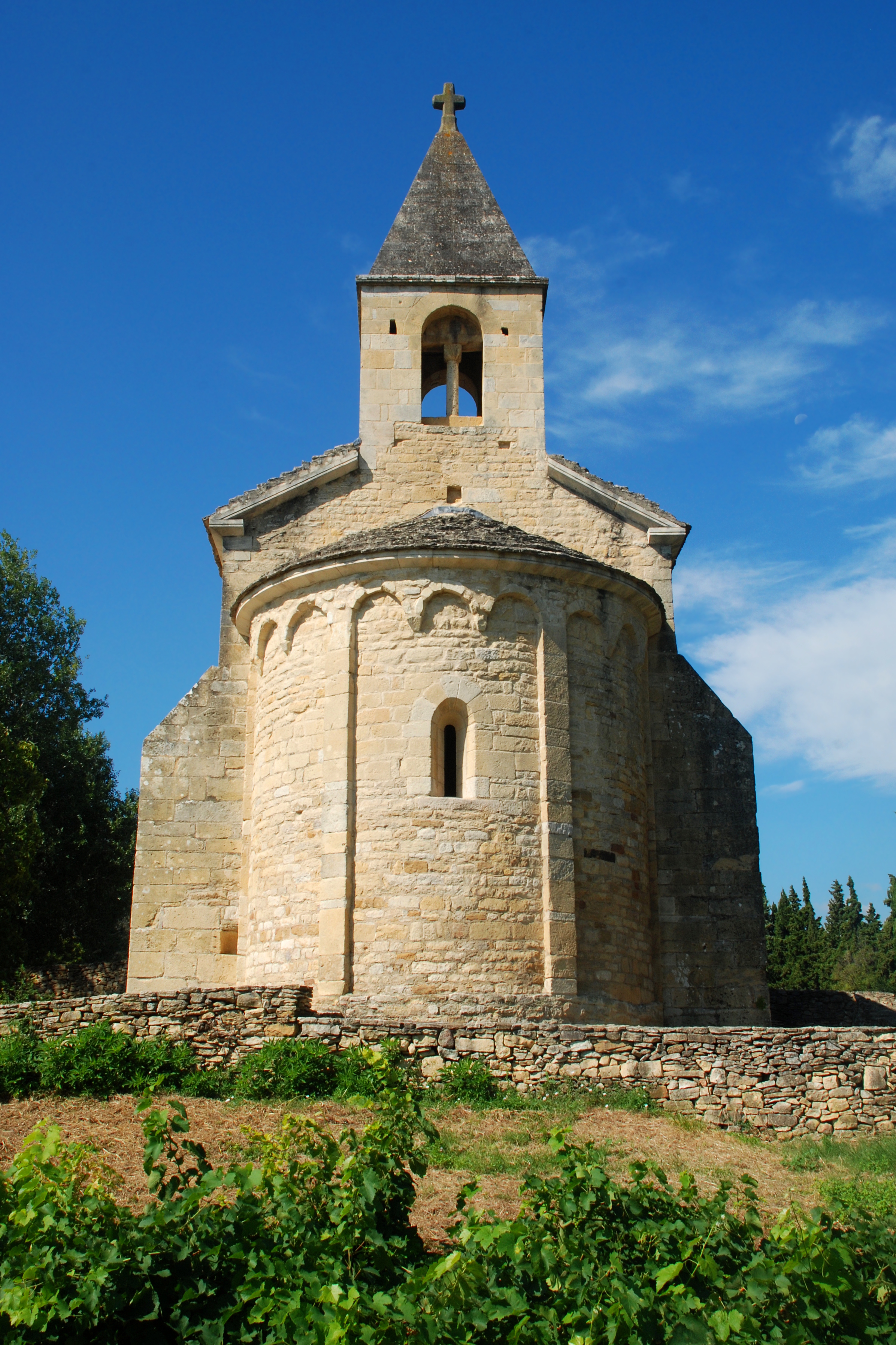 France - Gard - Chapelle Saint-Pierre de Vénéjan .